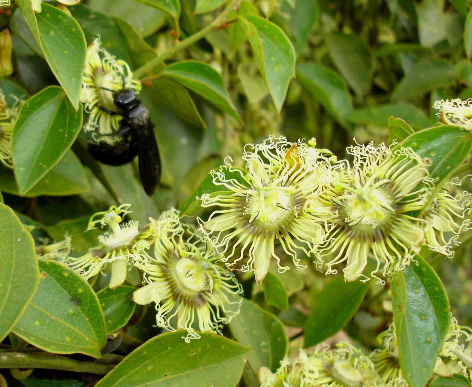 Passiflora auriculata (Subgénero Decaloba). Especie polinizada por el abejorro (Xilocopa sp.).